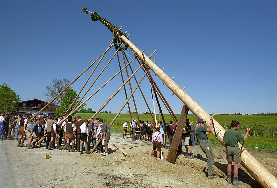 Aufstellen des Maibaums in Ellbach 2007